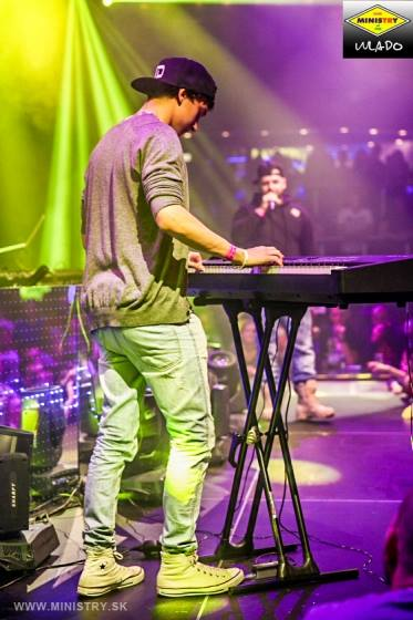 KoncertMD